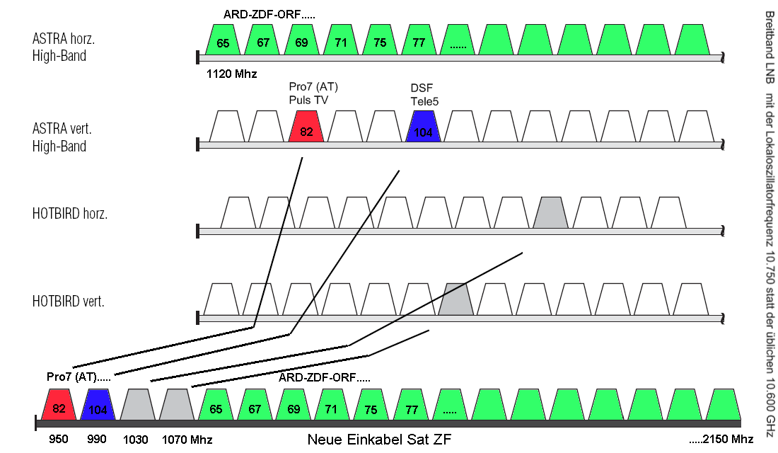 Programmierbares Einkabelsystem Funktionsweise